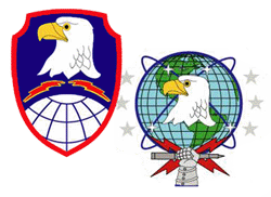 Wappen des US Army Forces Strategic Command (USARSTRAT)